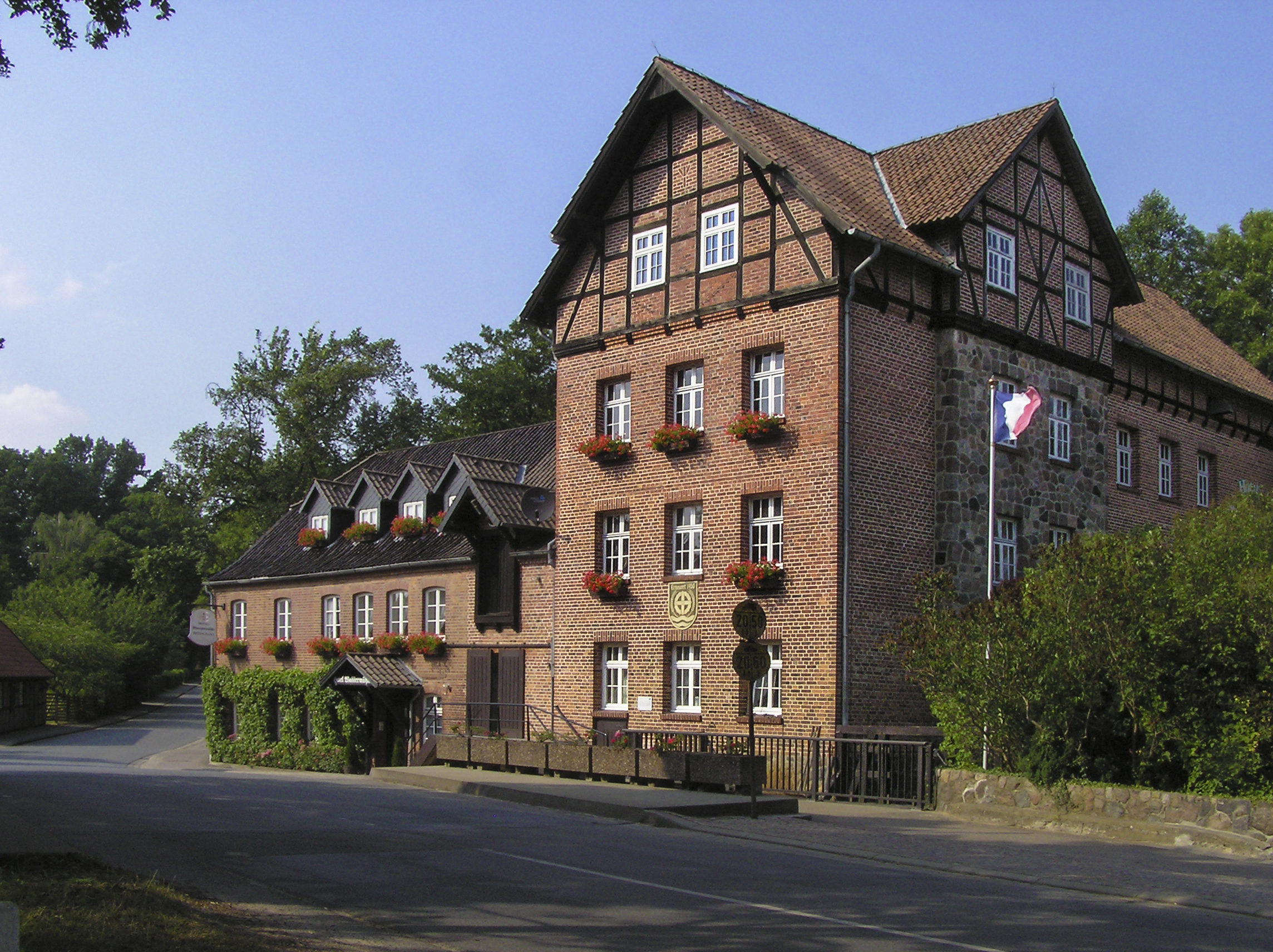 Watermill Heiligenthal,NS,Germany